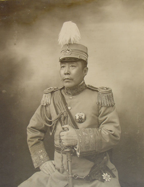 趙秉鈞